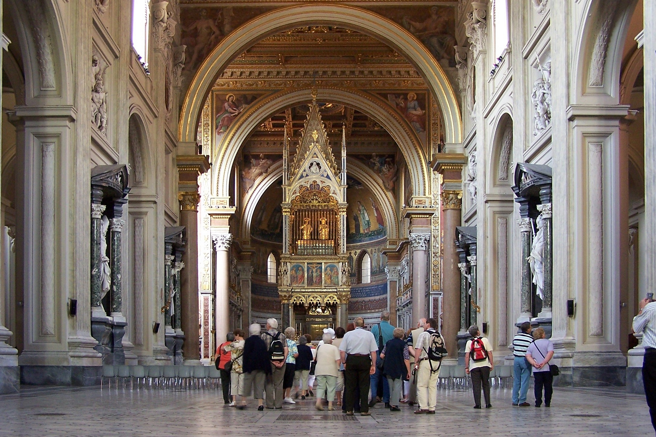 Rom, San Giovanni in Laterano